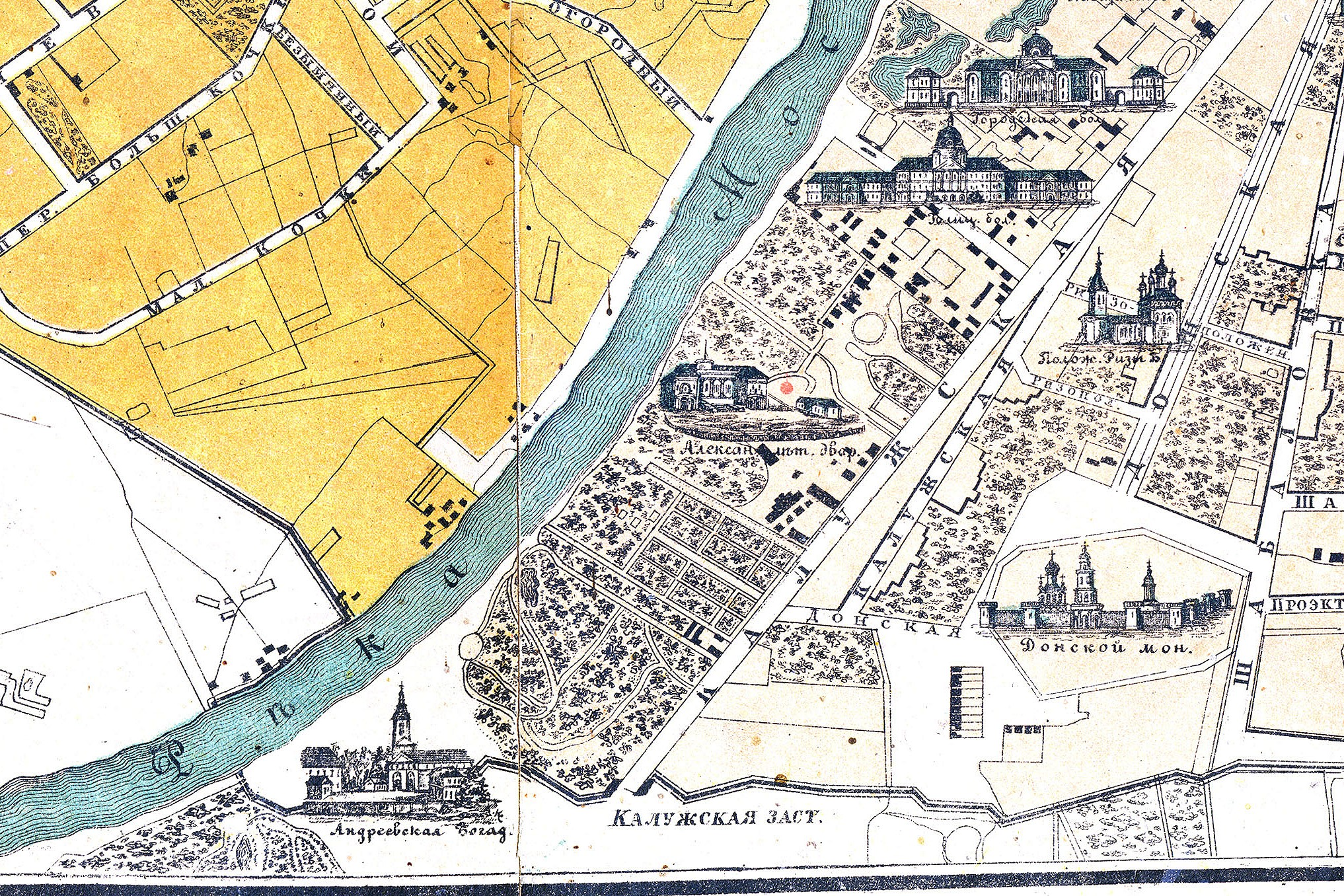 Москва. Калужская застава с Иллюстрированного плана города Москвы 1878 года Касаткина.